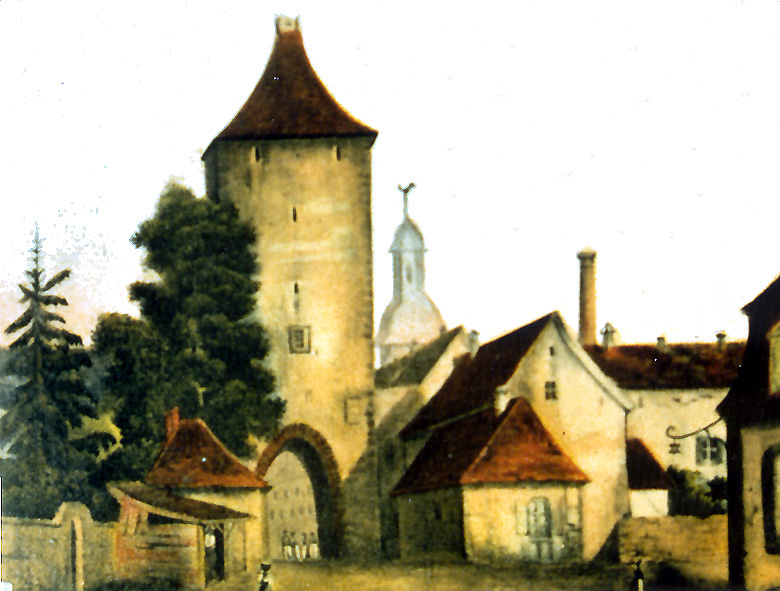 aquarelle peinte par Guillaume Herrmann du 30 septembre 1838 représentant la porte haute de Bouxwiller (Bas-Rhin).